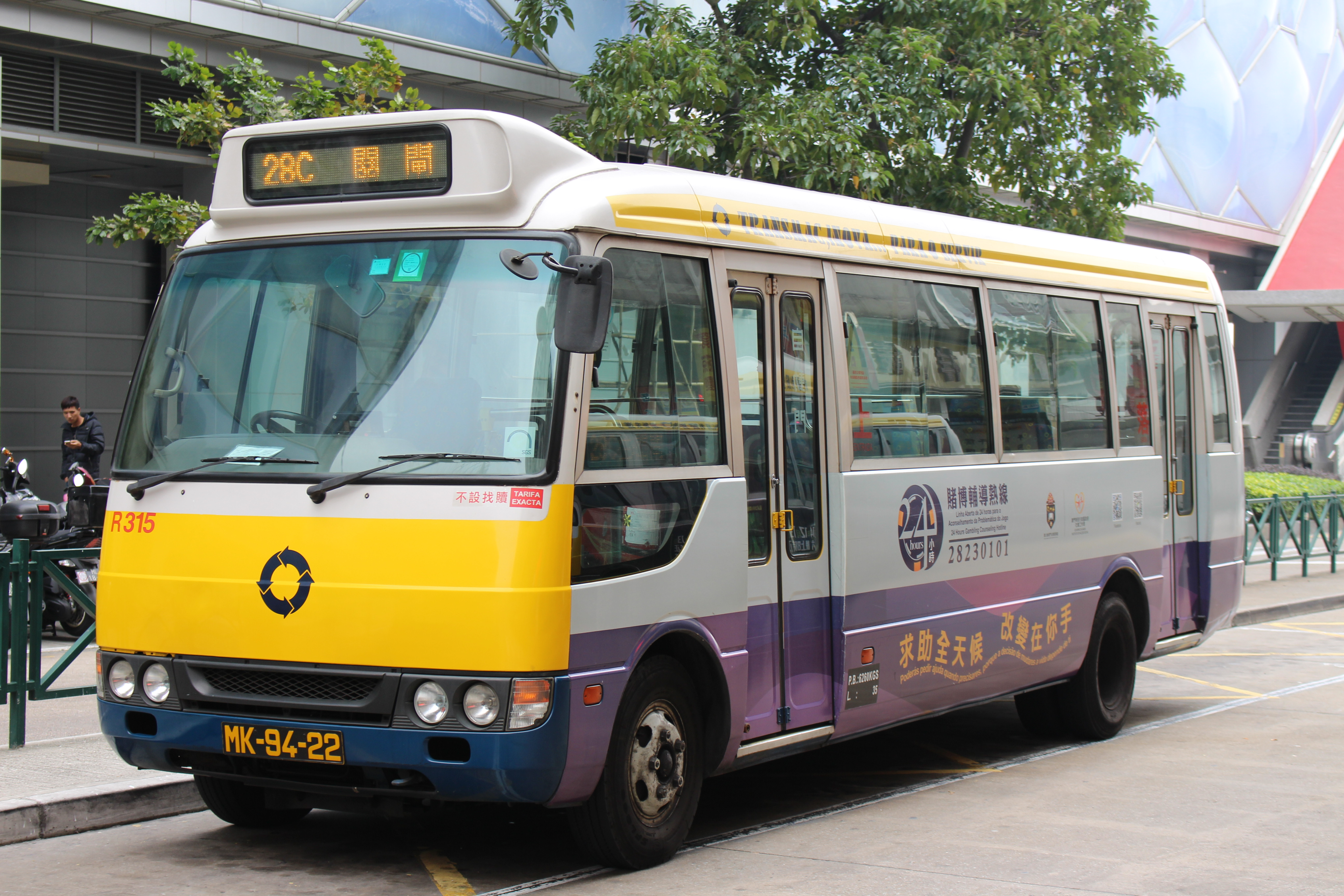 新福利三菱Rosa小巴行駛28C路線.